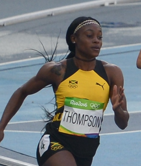 Elaine Thompson sur le 200m à Rio (série du 200m)